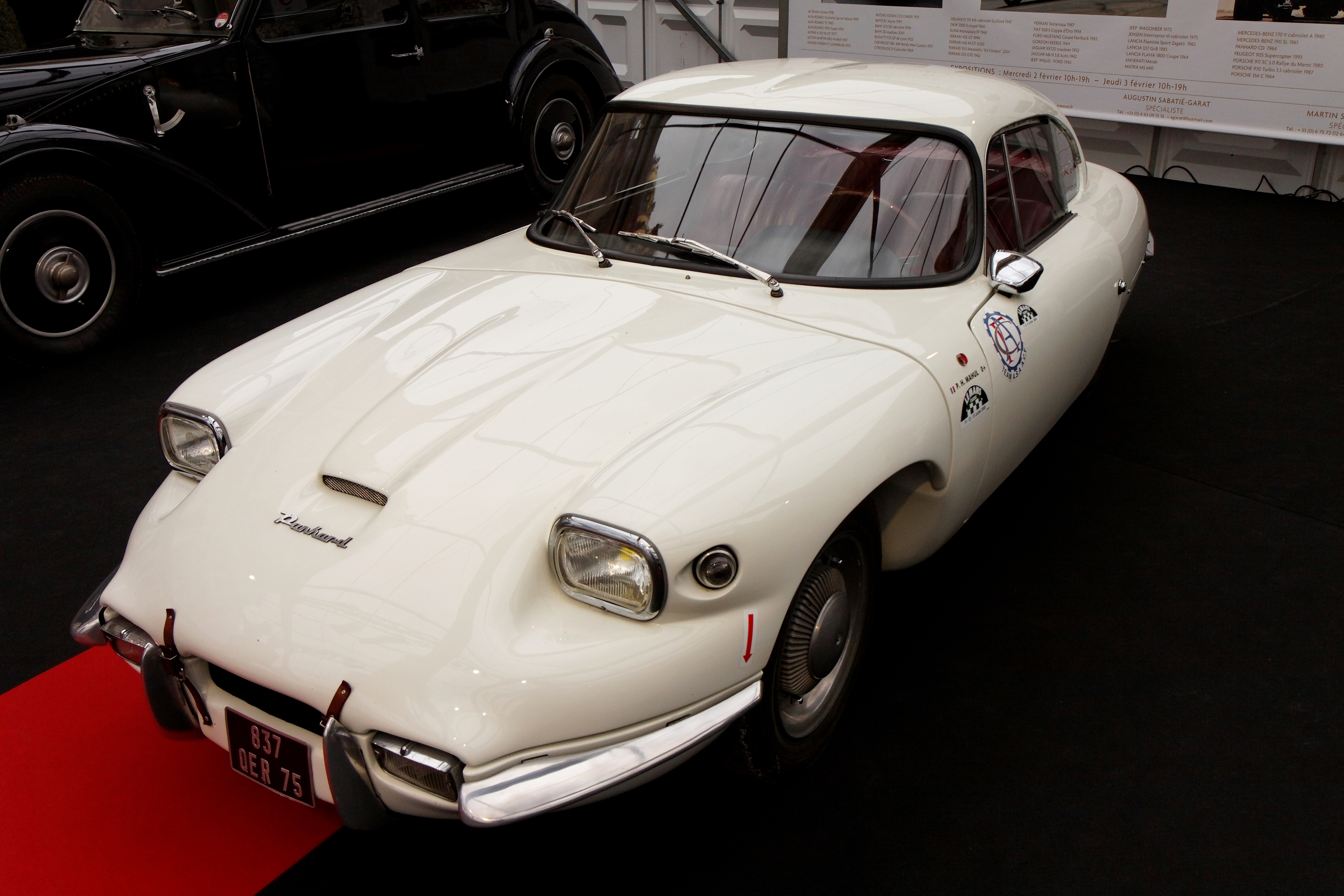 La Panard CD exposée devant le dôme des Invalides lors du festival automobile international 2011.